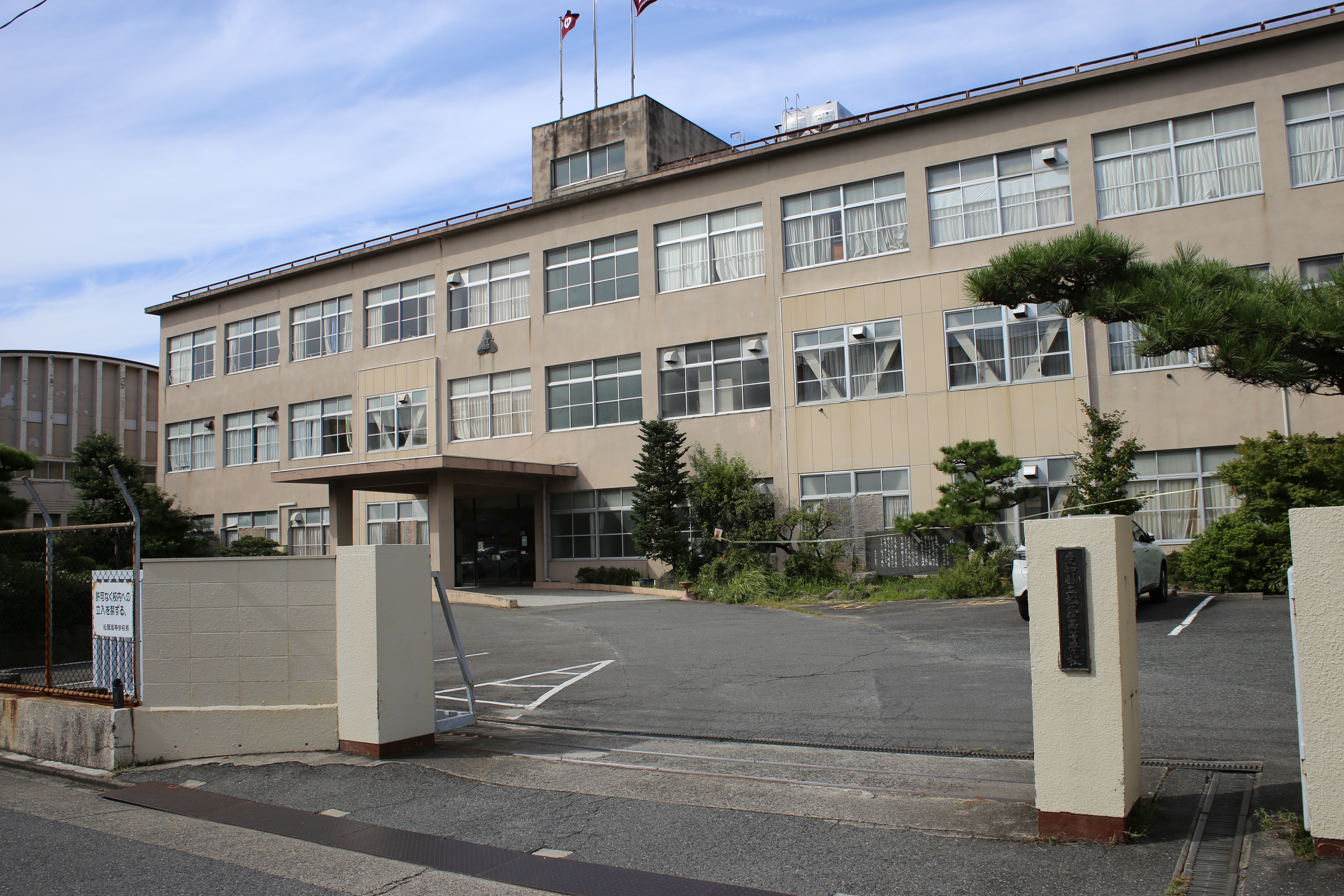 名古屋市中村区烏森町の愛知県立松蔭高等学校を南側公道東側より撮影